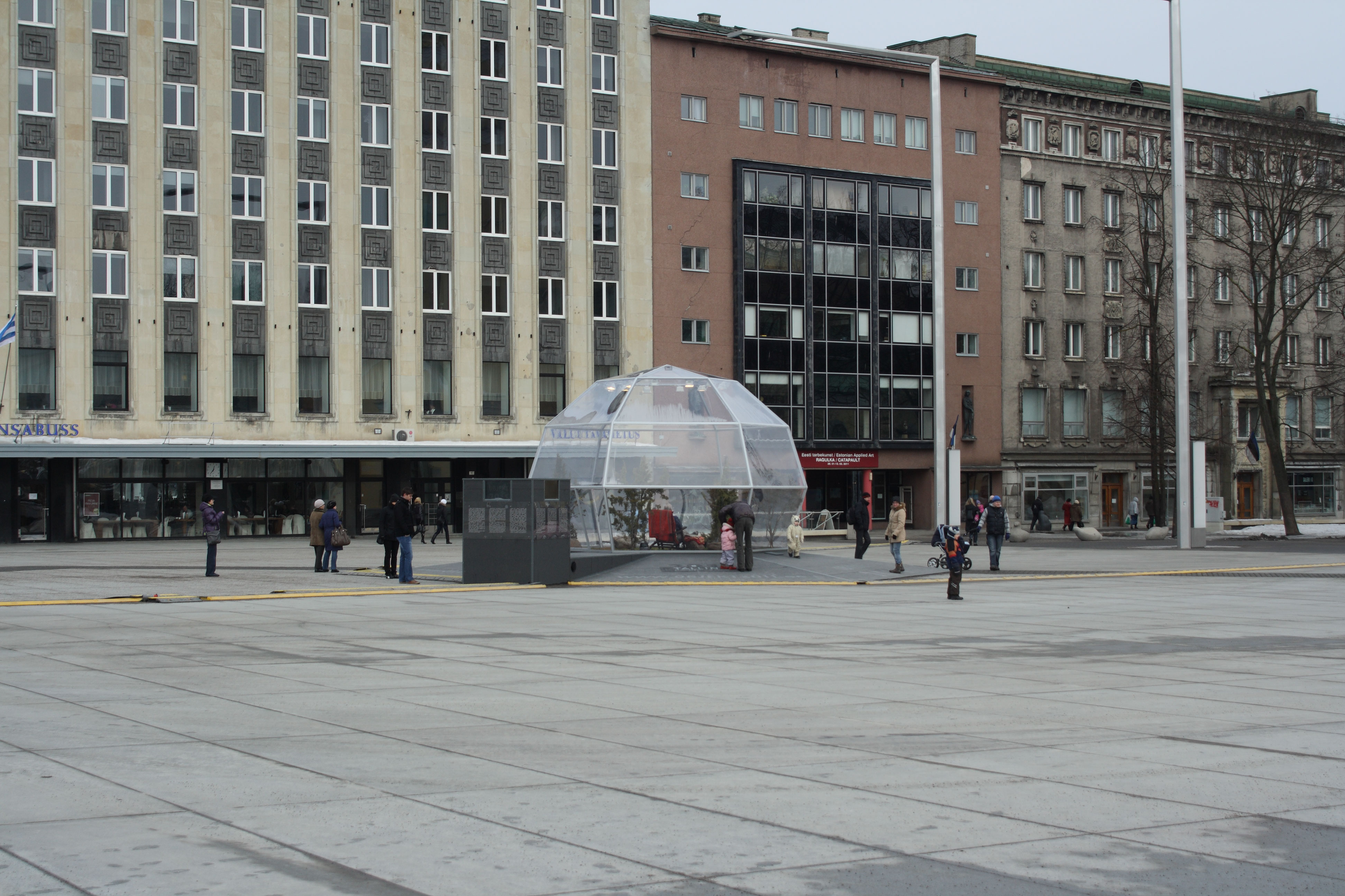 Objekt nr. 2011